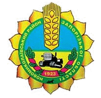 Герб Новомиколаївського району